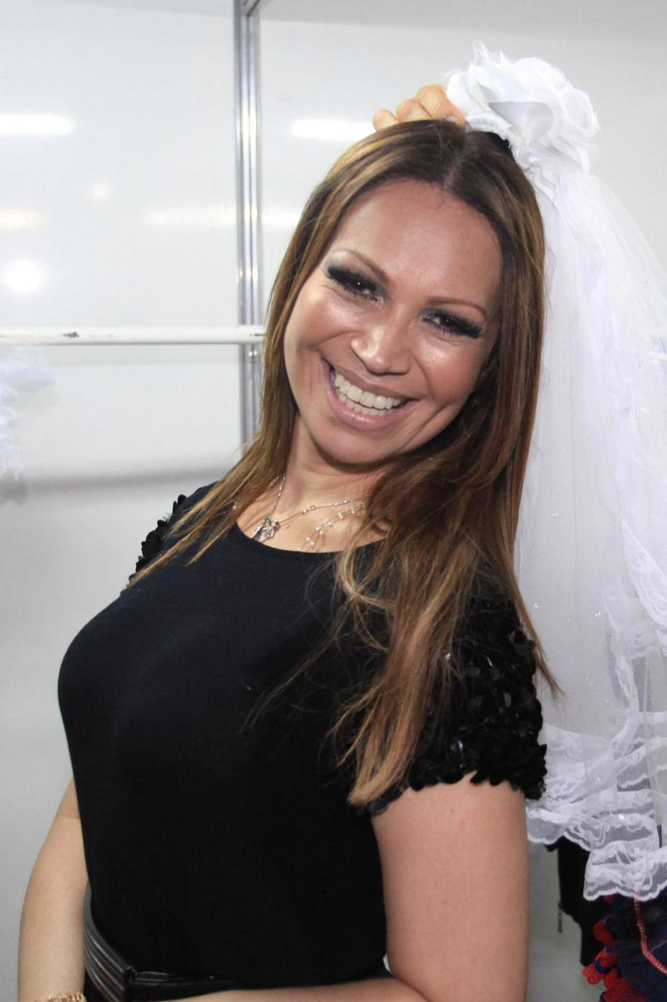 Solange Almeida da banda Aviões do Forró e Ivete Sangalo no Arraia do Cerveja & Cia de 2012.